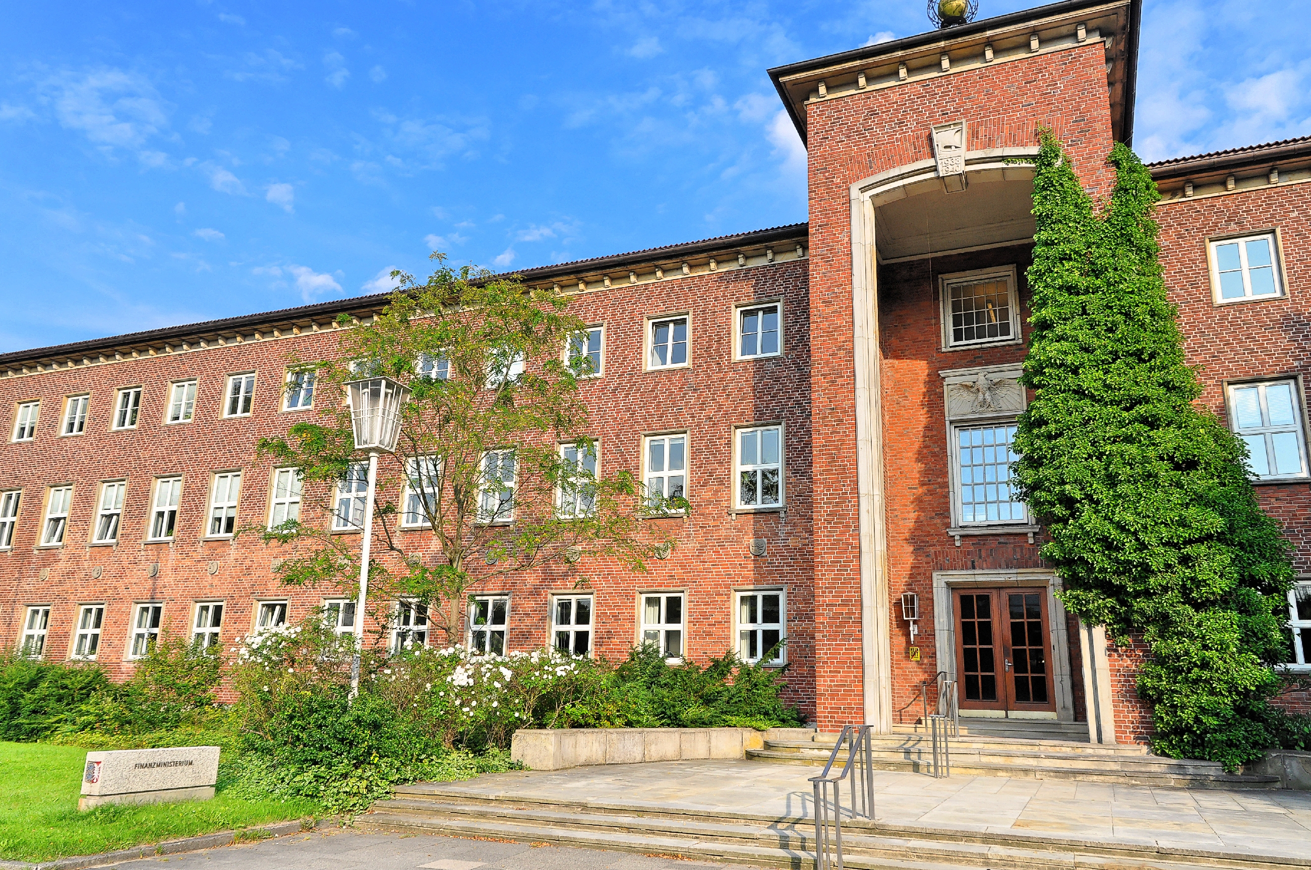 Kiel, Bilder wärend des Landtagsprojekt Schleswig-Holstein 2013